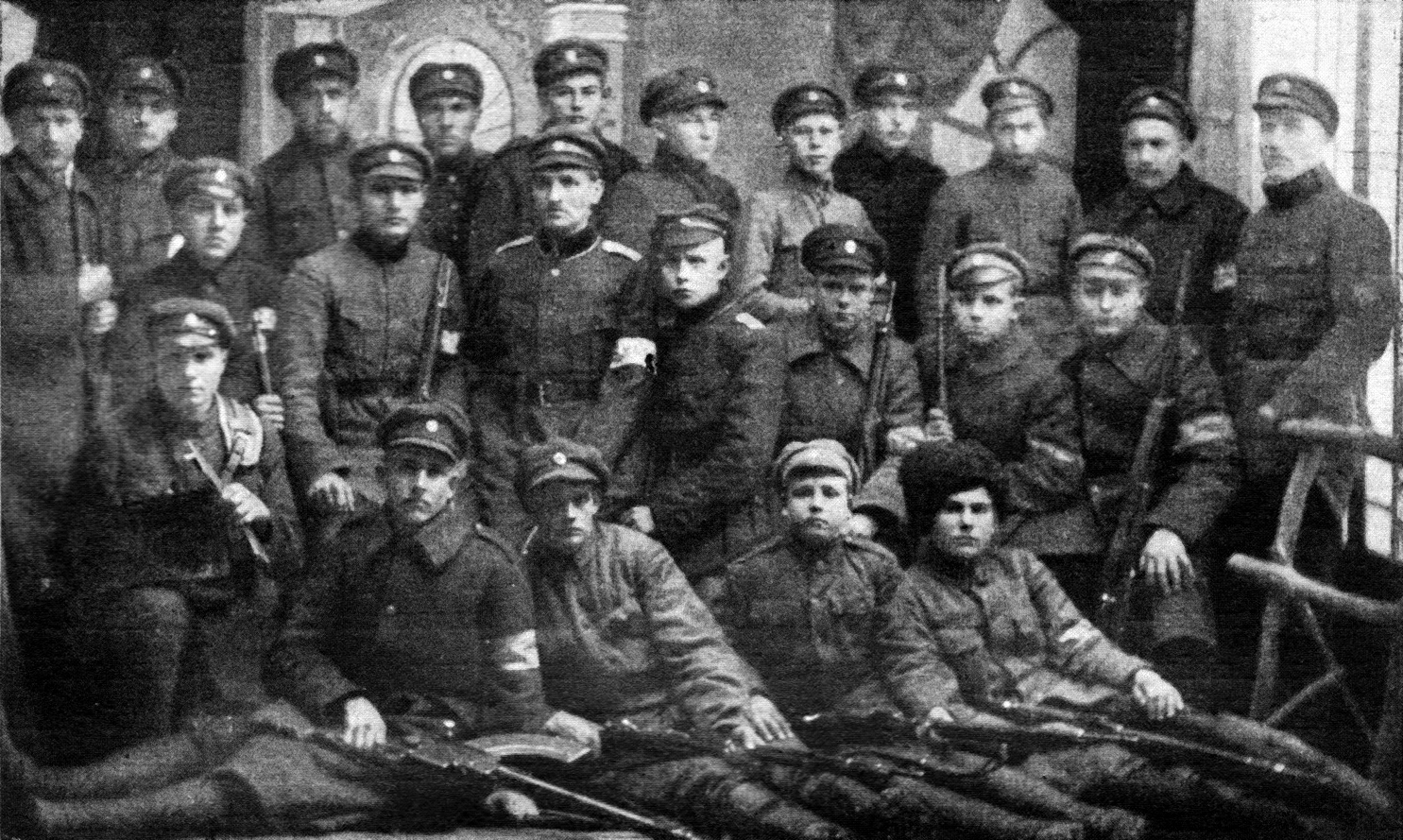 Soomusrongi nr. 3 luurajatekomando pärast Krasnaja Gorka operatsiooni novembris 1919.